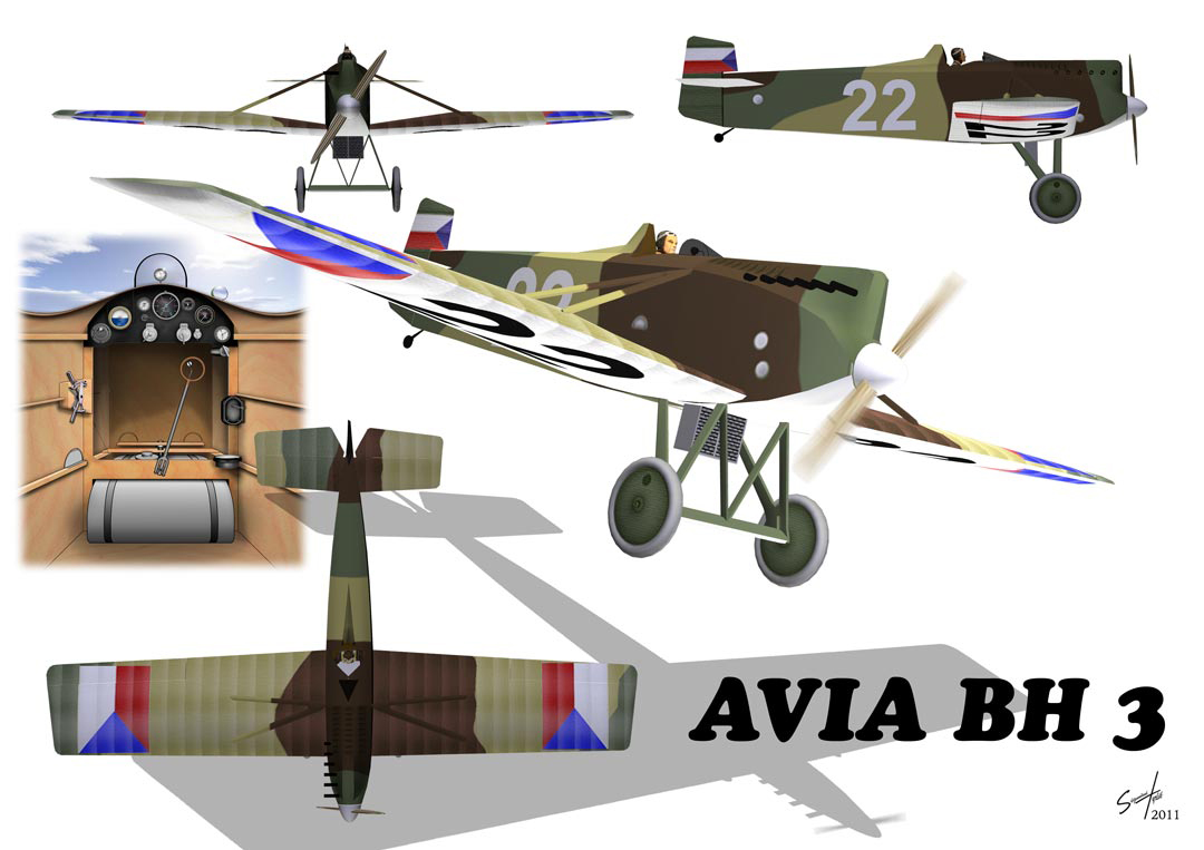 Závodní verze letounu Avia Bh 3 ,r.1923